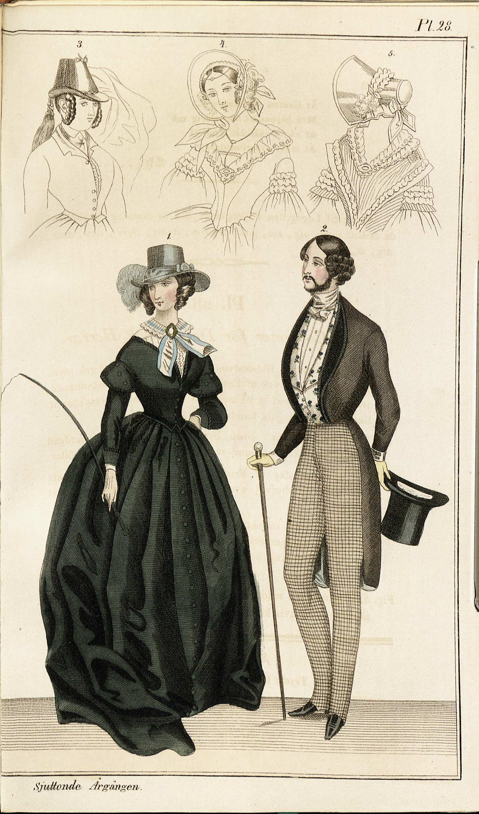 Ridkläder; Hatt; Plymer; Band; Rock; Frack; Väst; Pantalonger; Flor; Band; Klänning